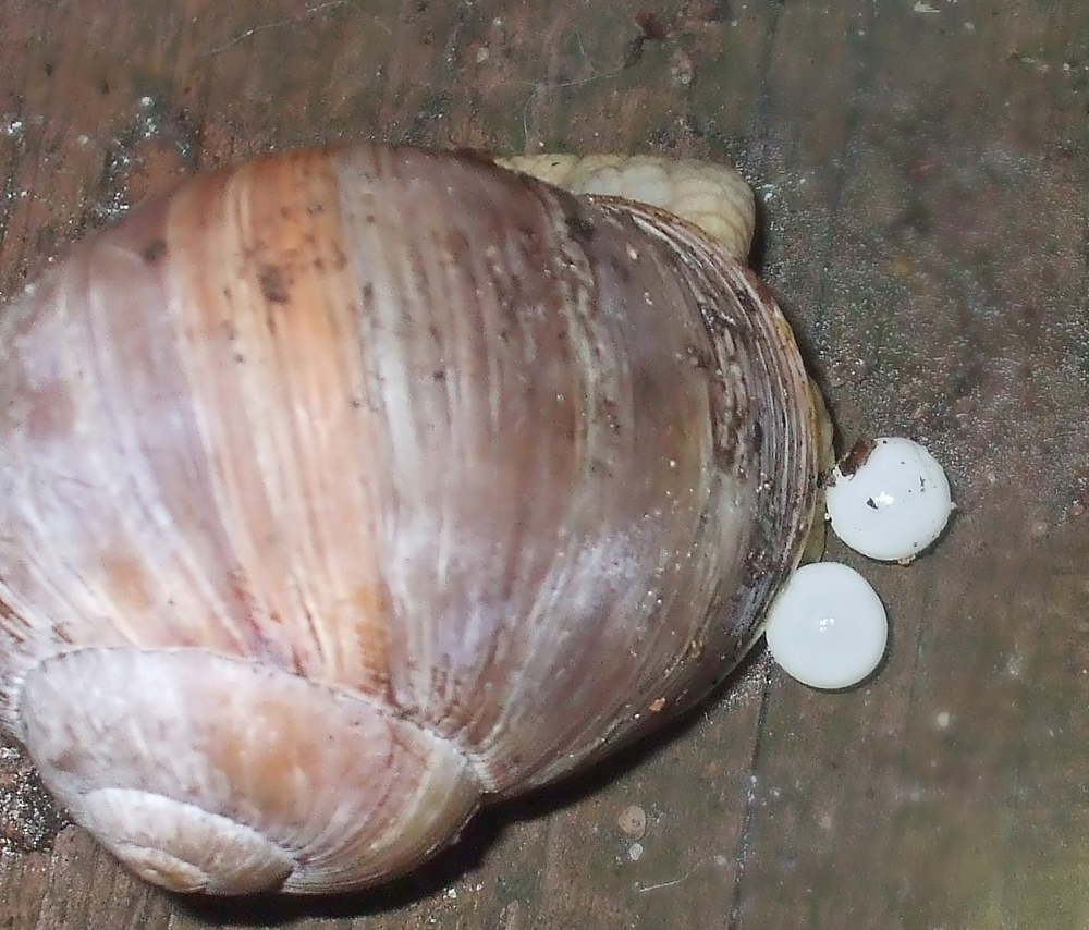 Виноградная улитка откладывает яйца (икру?)